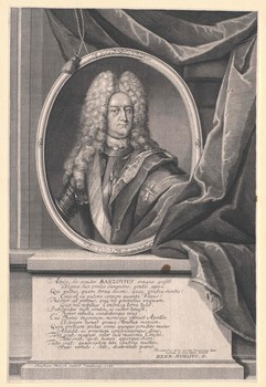 Porträt Christian Detlev zu Rantzau gestochen 1723 (post mortem) von Christian Fritzsch in Hamburg.